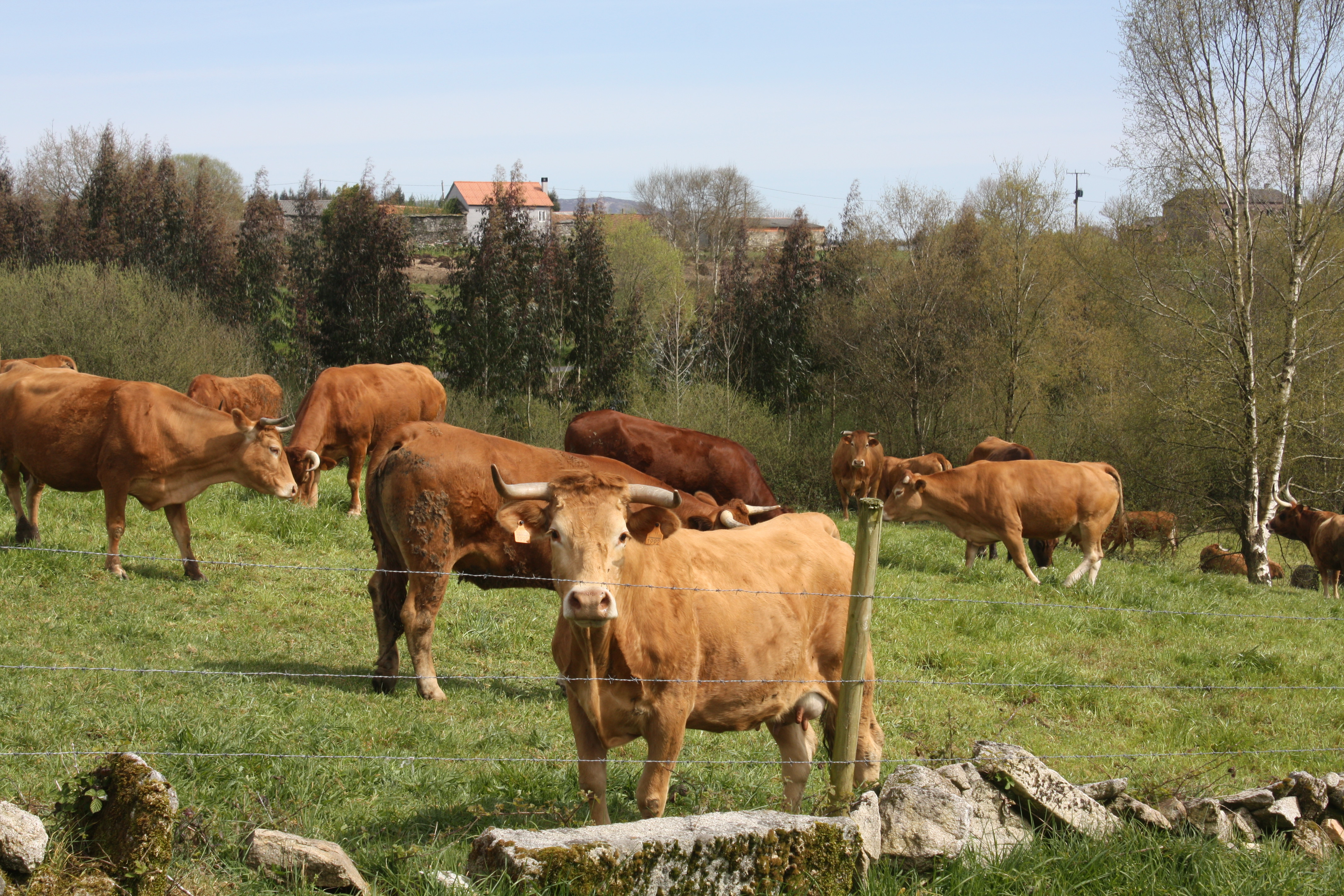 Rabaño de vacas rubias, en Dozón (Pontevedra)